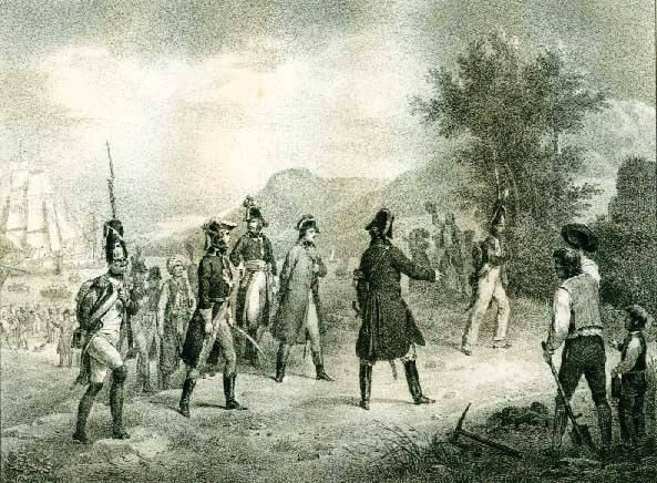 Lithographie du débarquement de Napoléon à « Fréjus » en 1799.